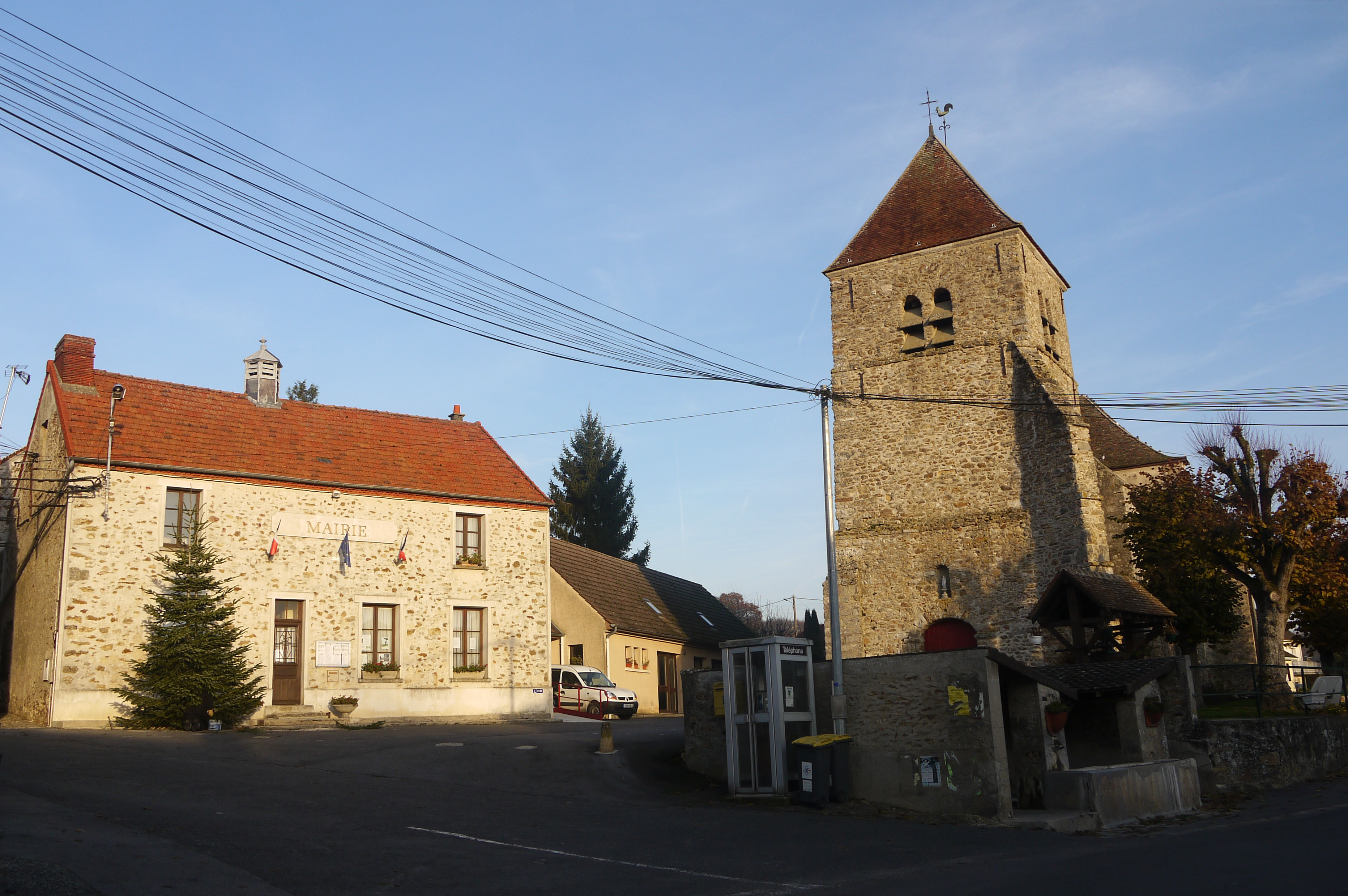 La place de l'Église à Essises